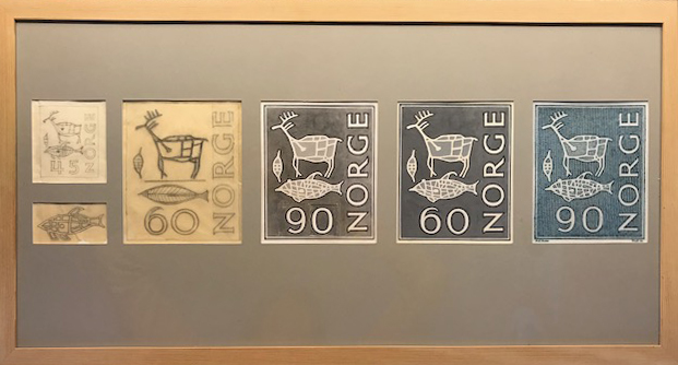 Utvikling fra skisse til ferdige grafiske blad for norske bruksfrimerker av Arne E. Holm1960-årene